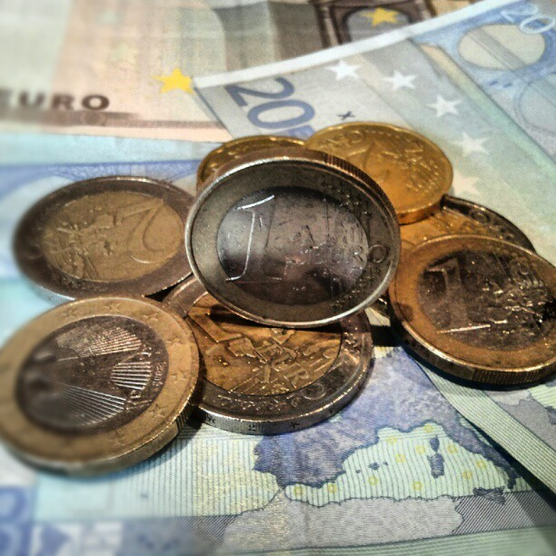 Abgebildet sind Euromünzen und Scheine